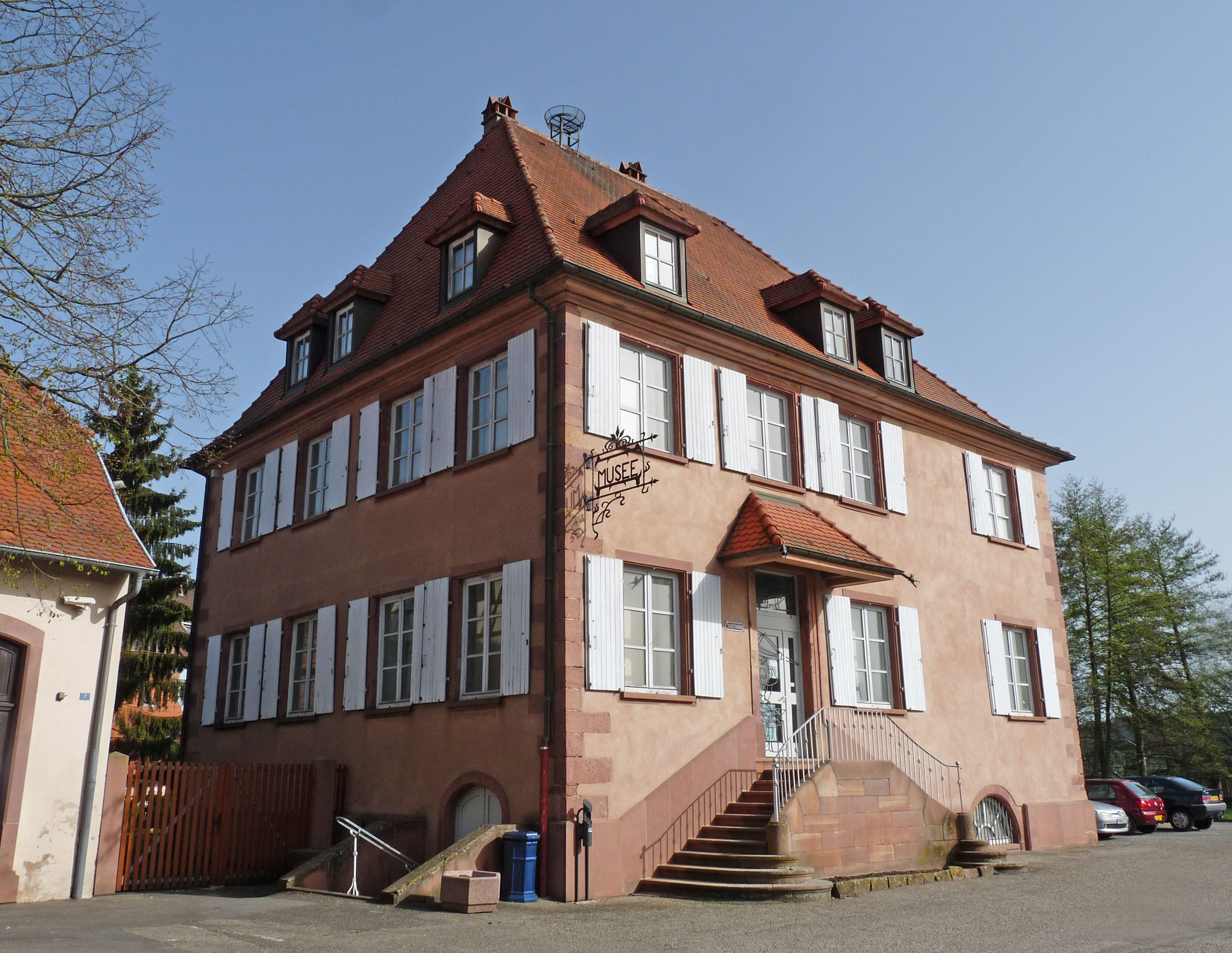 Musée du Fer à Reichshoffen (Bas-Rhin).